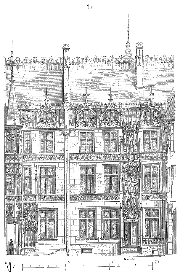 ... Nous donnons (37) la façade du grand logis comprise entre la tourelle et l'escalier. Tout le monde connaît l'hôtel de Cluny, qui contient aujourd'hui le musée des objets du moyen âge et qui est bâti sur les thermes de Julien; cet édifice est du même temps que l'hôtel de La Trémoille et présente une disposition analogue. Sur la rue des Mathurins, s'élève un mur de clôture crénelé, le logis est situé entre cour et jardin. Nous empruntons à M. le baron de Guilhermy cet aperçu sommaire de l'histoire de cet hôtel ...